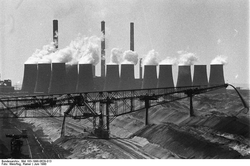 Kraftwerk Boxberg ADN-Weisflog/ 29.6.90 Bez. Cottbus: Energiewirtschaft Als Boxberger Energie AG versucht sich das Kraftwerk Boxberg, größtes Braunkohlewerk der DDR, beim Weg in die Marktwirtschaft auf eigenen Füße zu stellen. Belastet wird dieses Vorhaben derzeit durch den von der Regierung geplanten Verkauf der DDR-Energieerzeugungs- und Verteilungsanlagen an die drei führenden BRD-Stromkonzerne Bayernwerk AG, PreussenElektra AG und Rheinisch-Westfälsiche Elektrizitätswerke AG.